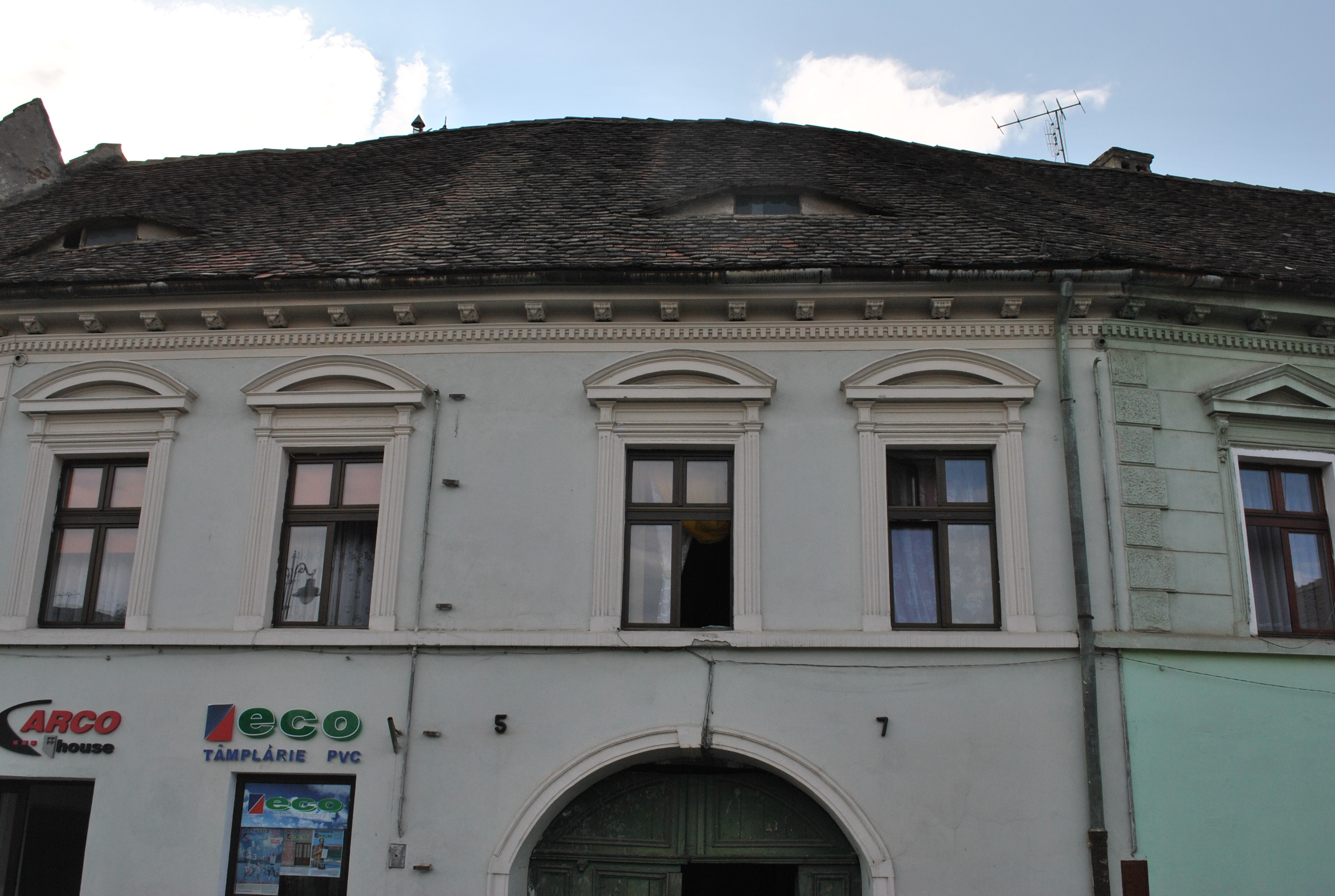 Fostul Han " La Mielul Alb" sec. XV - XVI, sf. sec. XVIII - înc. sec. XIX